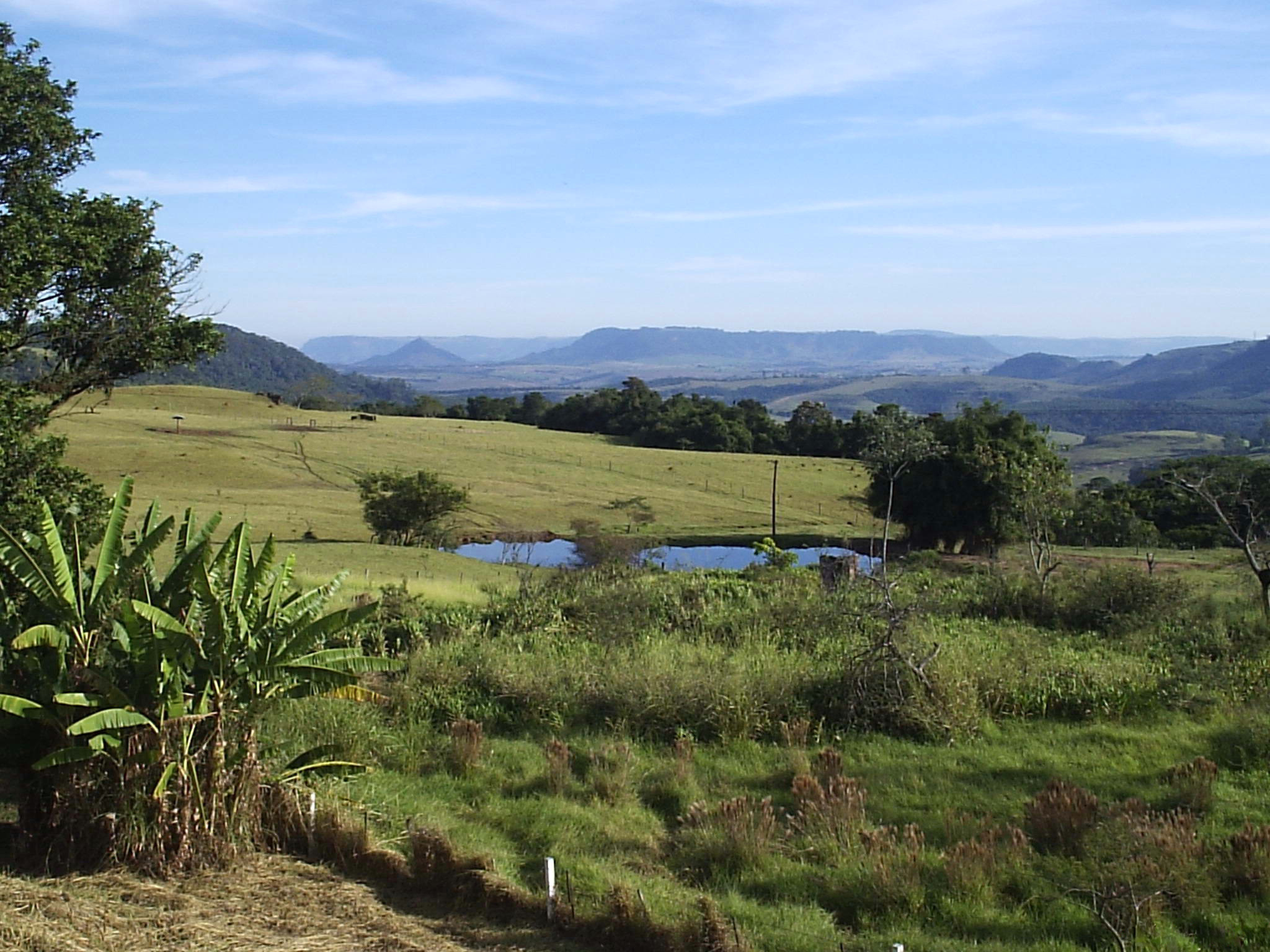 Serra de Santana vista da Rodovia Washington Luís - SP-310 Km-200